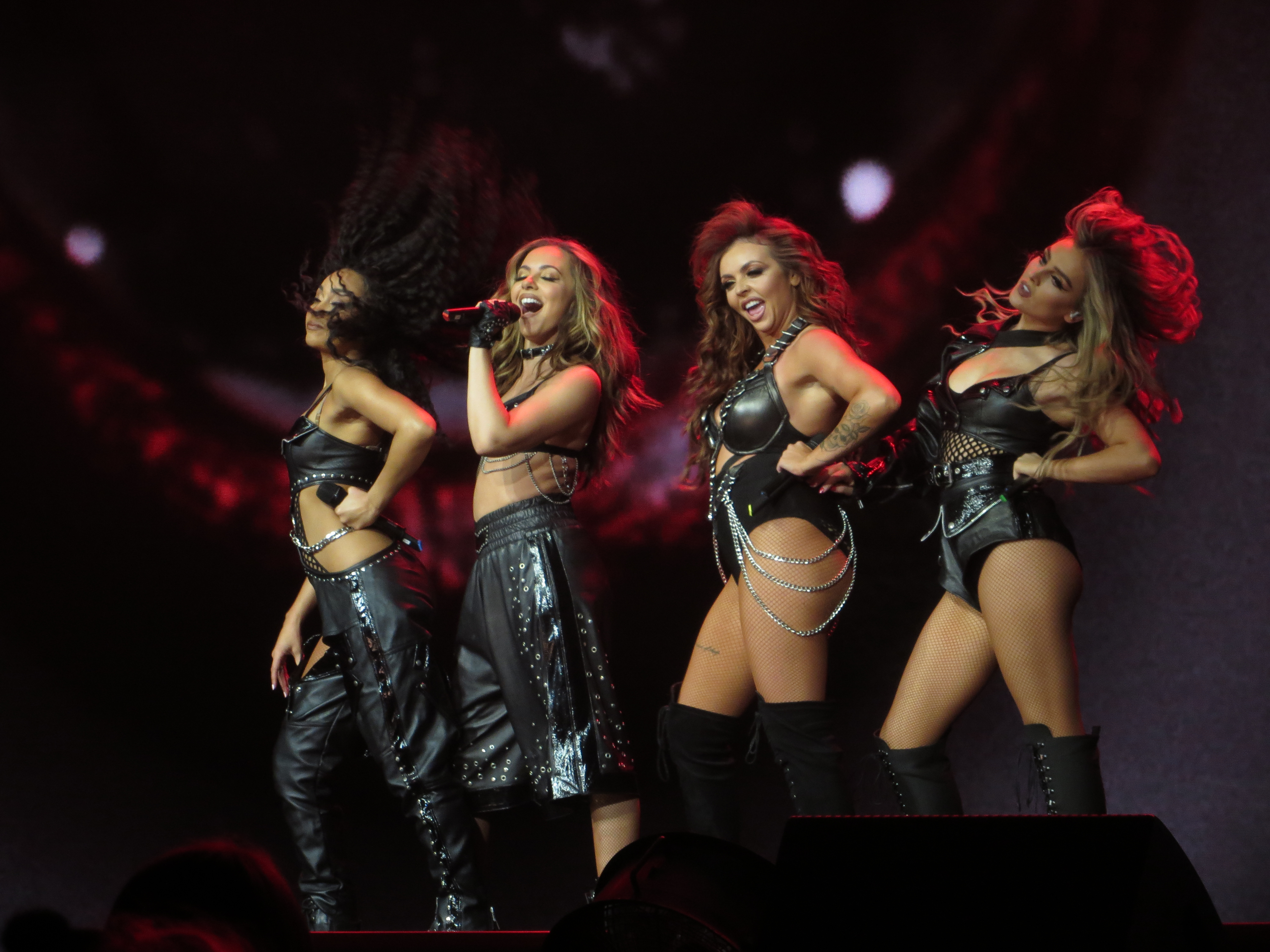 Little Mix 5